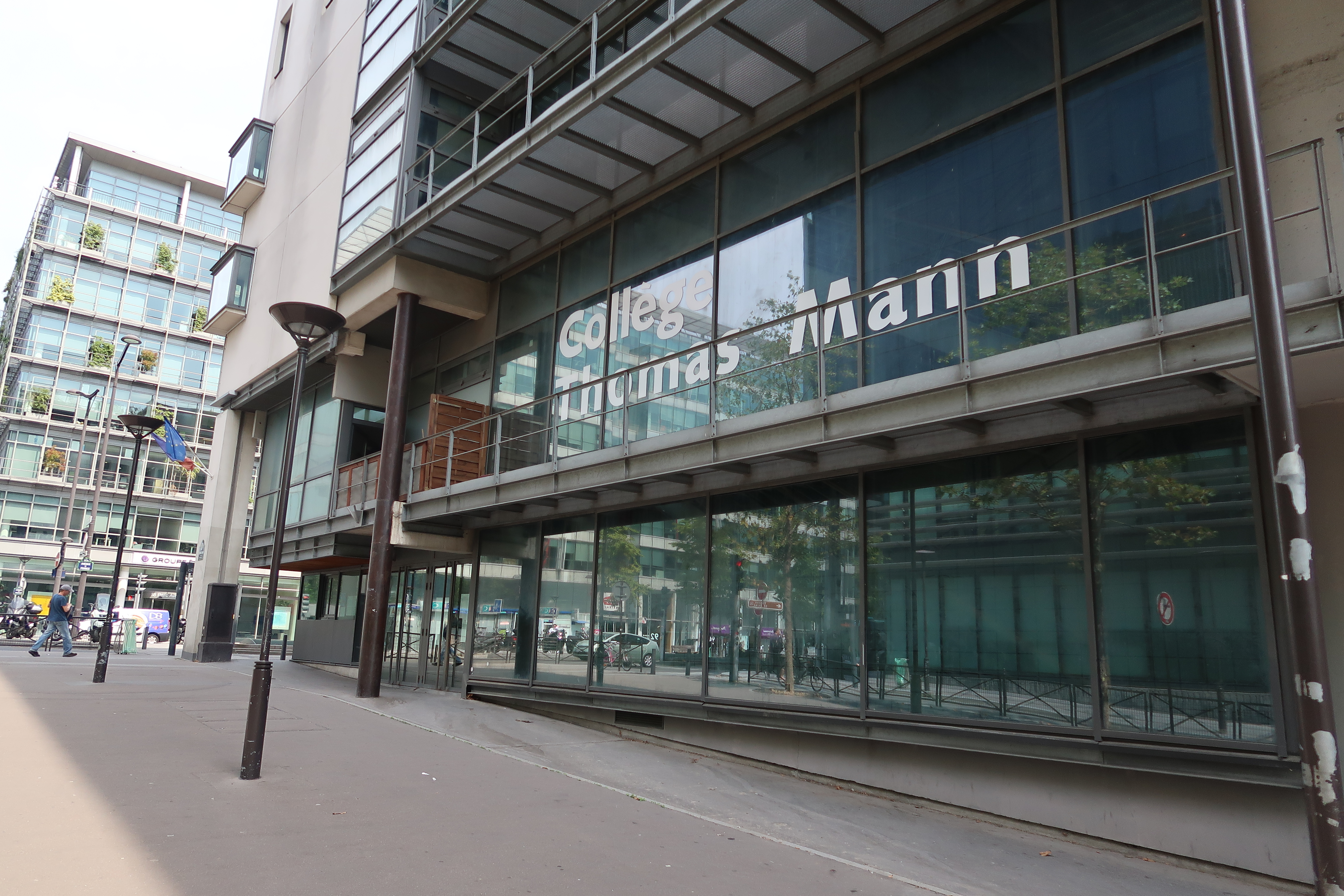 Collège Thomas-Mann, rue Thomas-Mann, autre accès avenue de France (Paris, 13e).